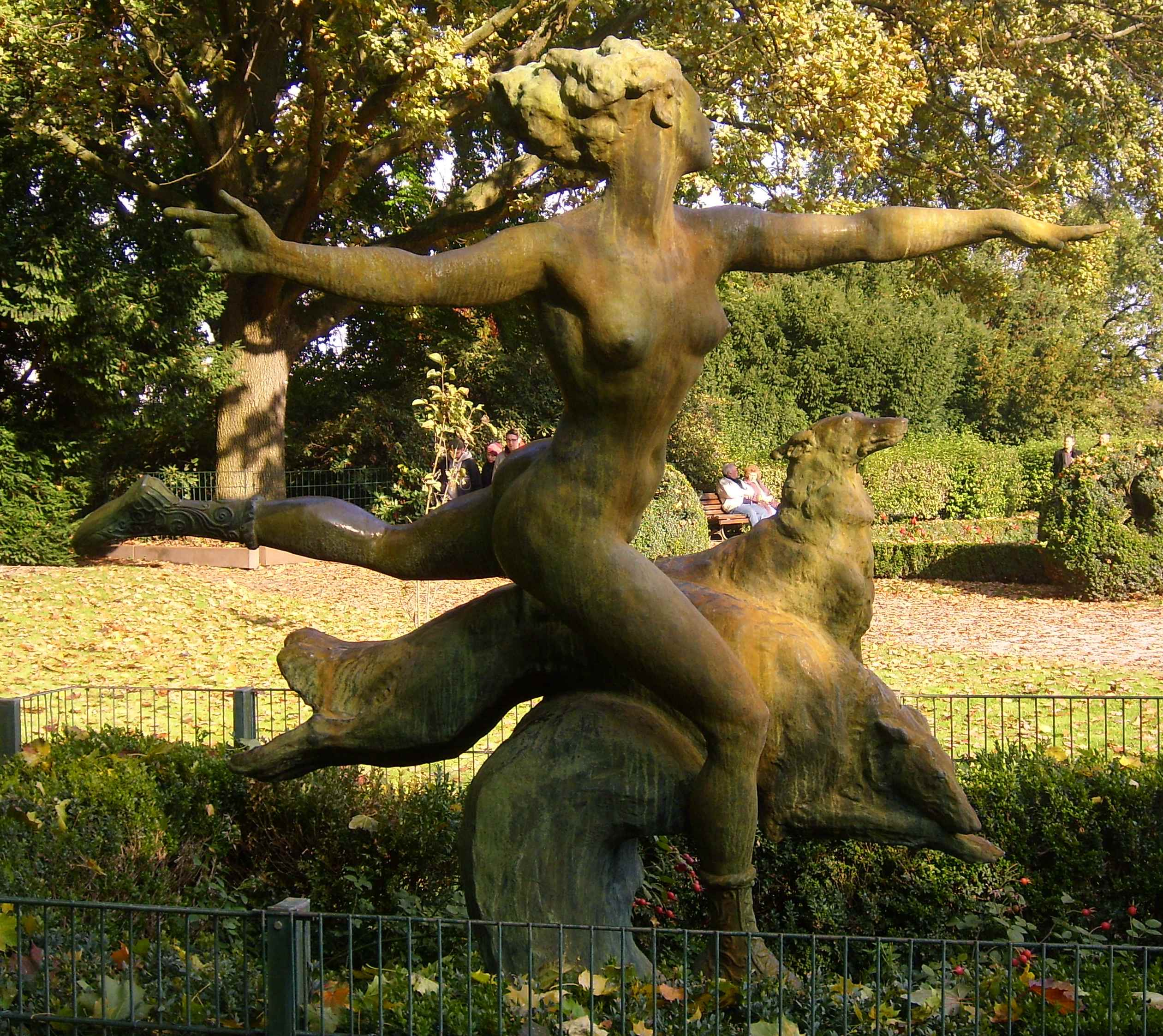 Diana mit den Jagdhunden, Bronze, Walter Schott, 1927